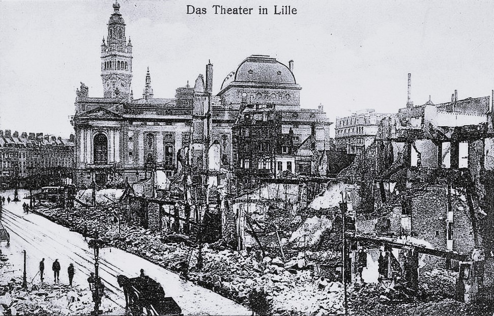 Bildseite der Ansichtskarte von Alfred Grohs aus der Zeit des Ersten Weltkrieges, hier mit dem Titel Das Theater in Lille"...